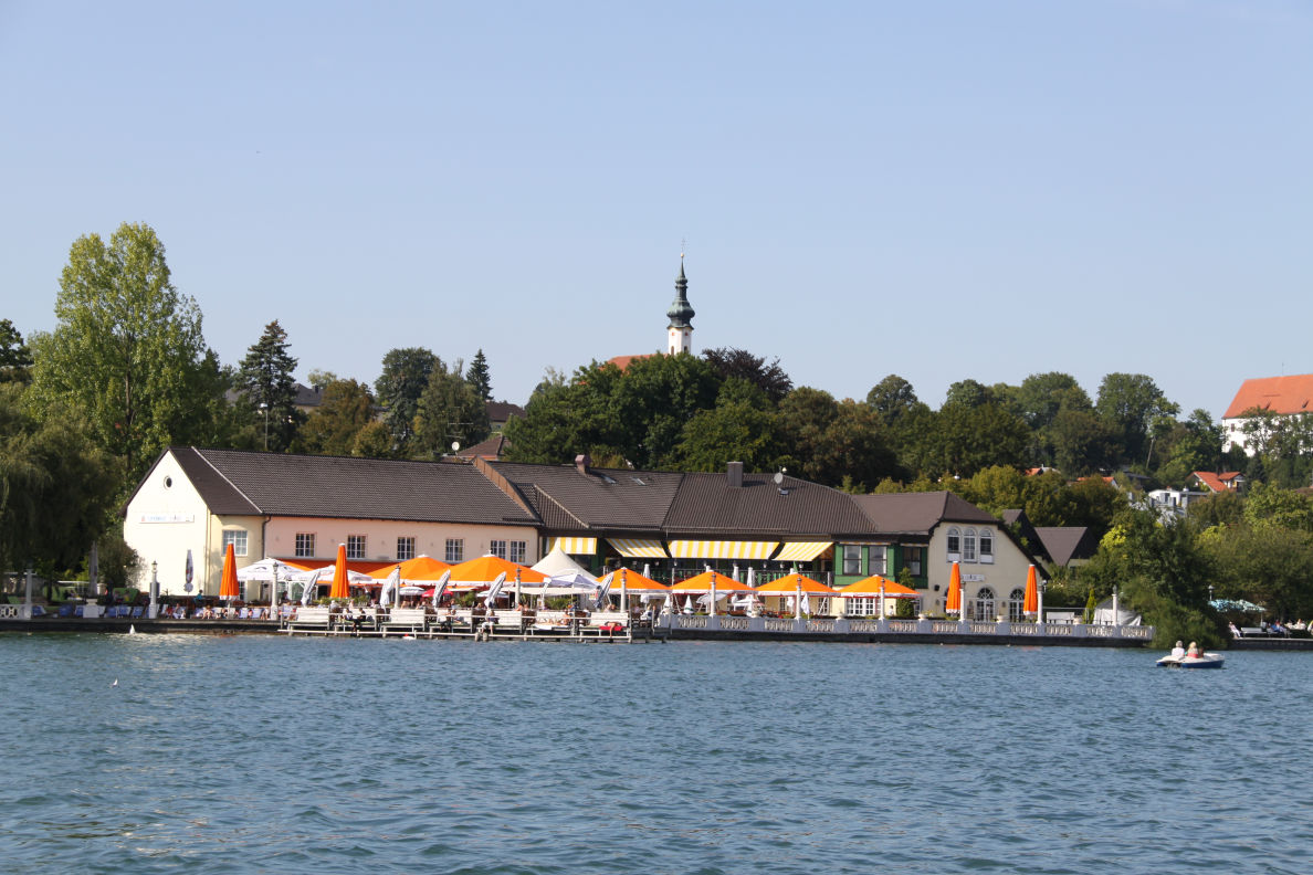 Undosa